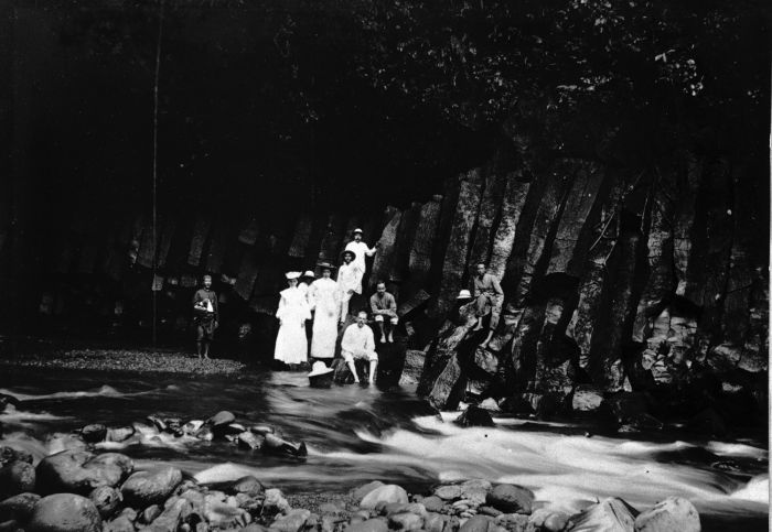 Foto. Diverse mensen tijdens een picknick bij de waterval in de Peloes-rivier bij Ketajassa in het district Soekaradja, Midden-Java